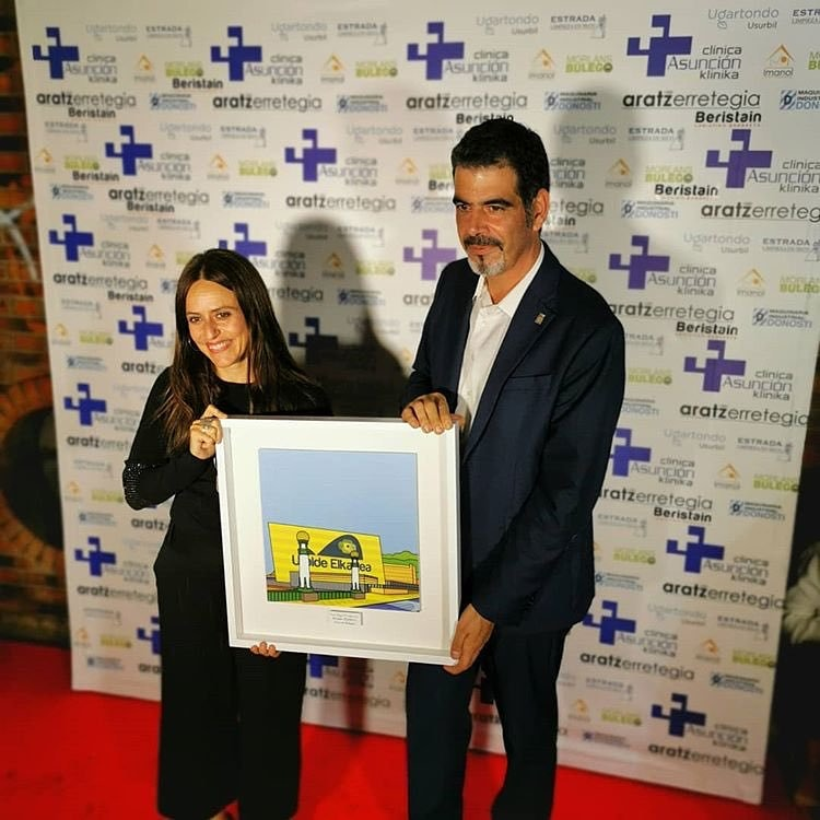 Ramon Labayen saria 2019